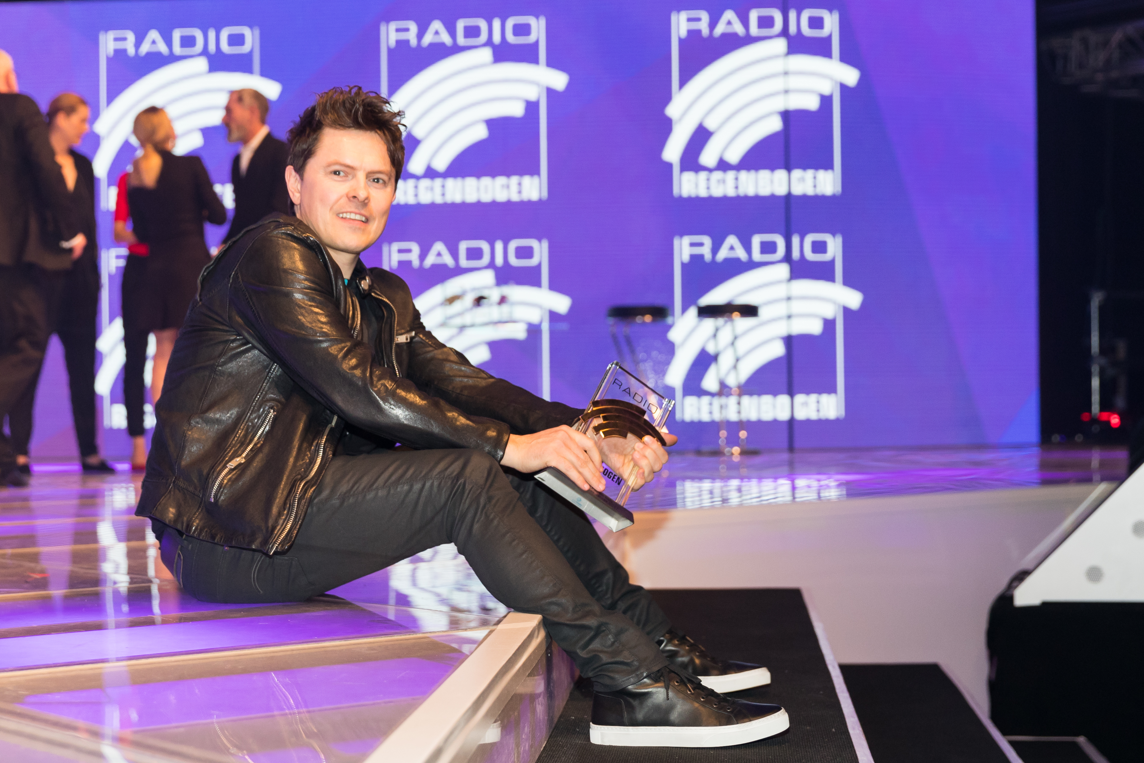 during Radio Regenbogen Award 2018 at Europapark, Rust, Baden-Württemberg, Germany on 2018-03-23, Photo: Sven Mandel